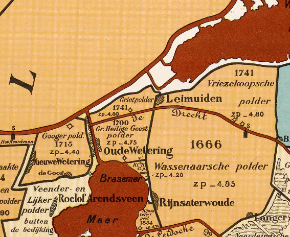 Grietpolder